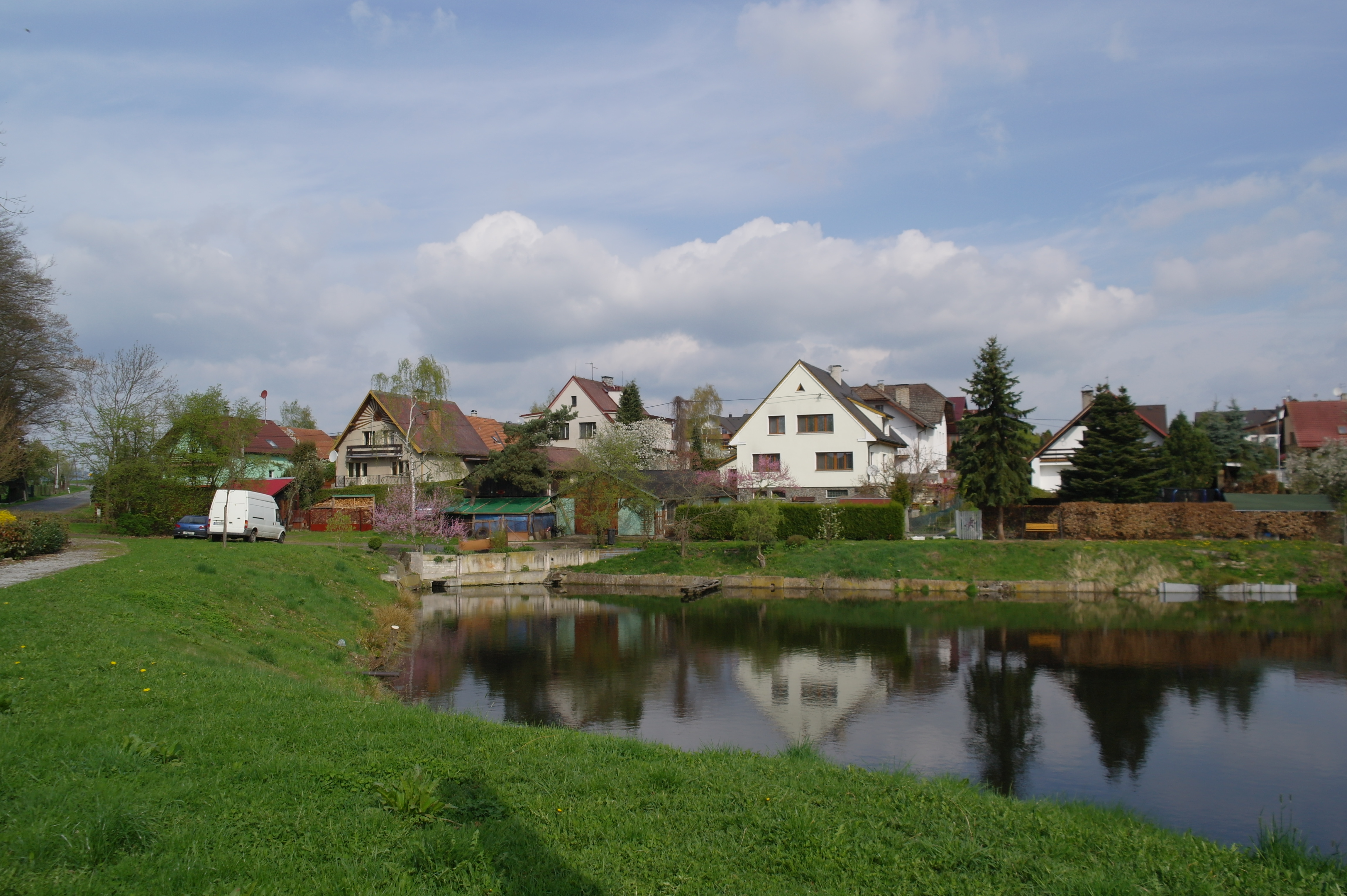 Čínov, rybník ve středu vesnice